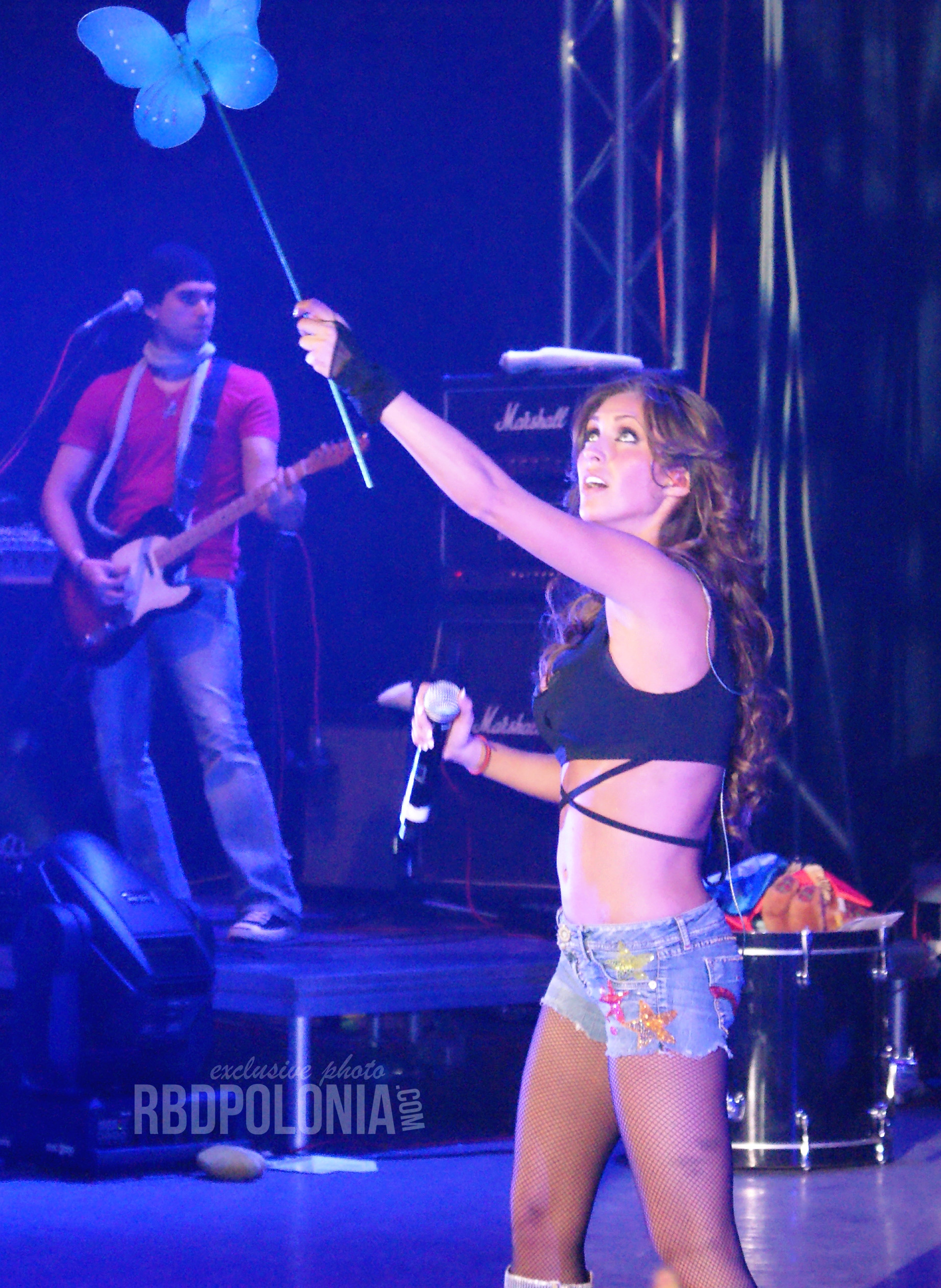 Anahí durante su gira Mi Delirio World Tour en Serbia, 10 de marzo de 2010.